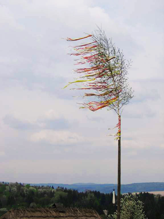 Feast birch tree in Svidnik skansen.